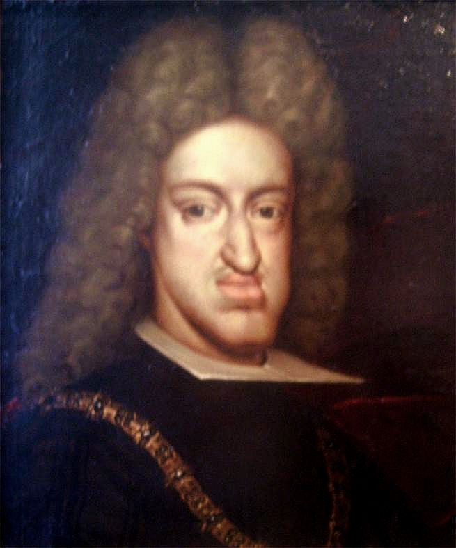 Retrato de busto del rey Carlos II de España